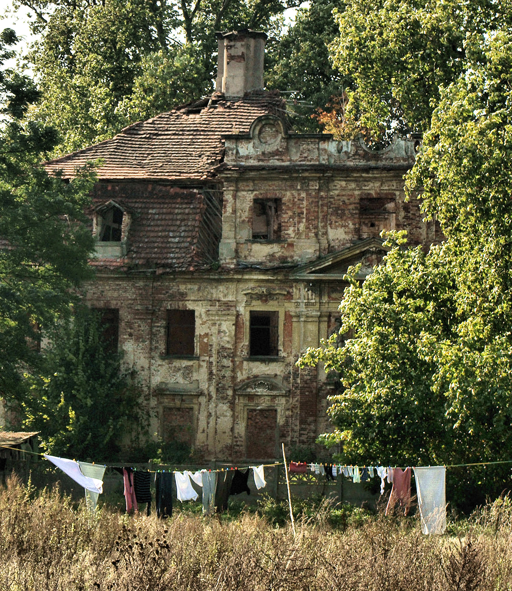 Parchów - pałac w ruinie (zabytek nr A/3221/956 z dn. 4.10.1961)